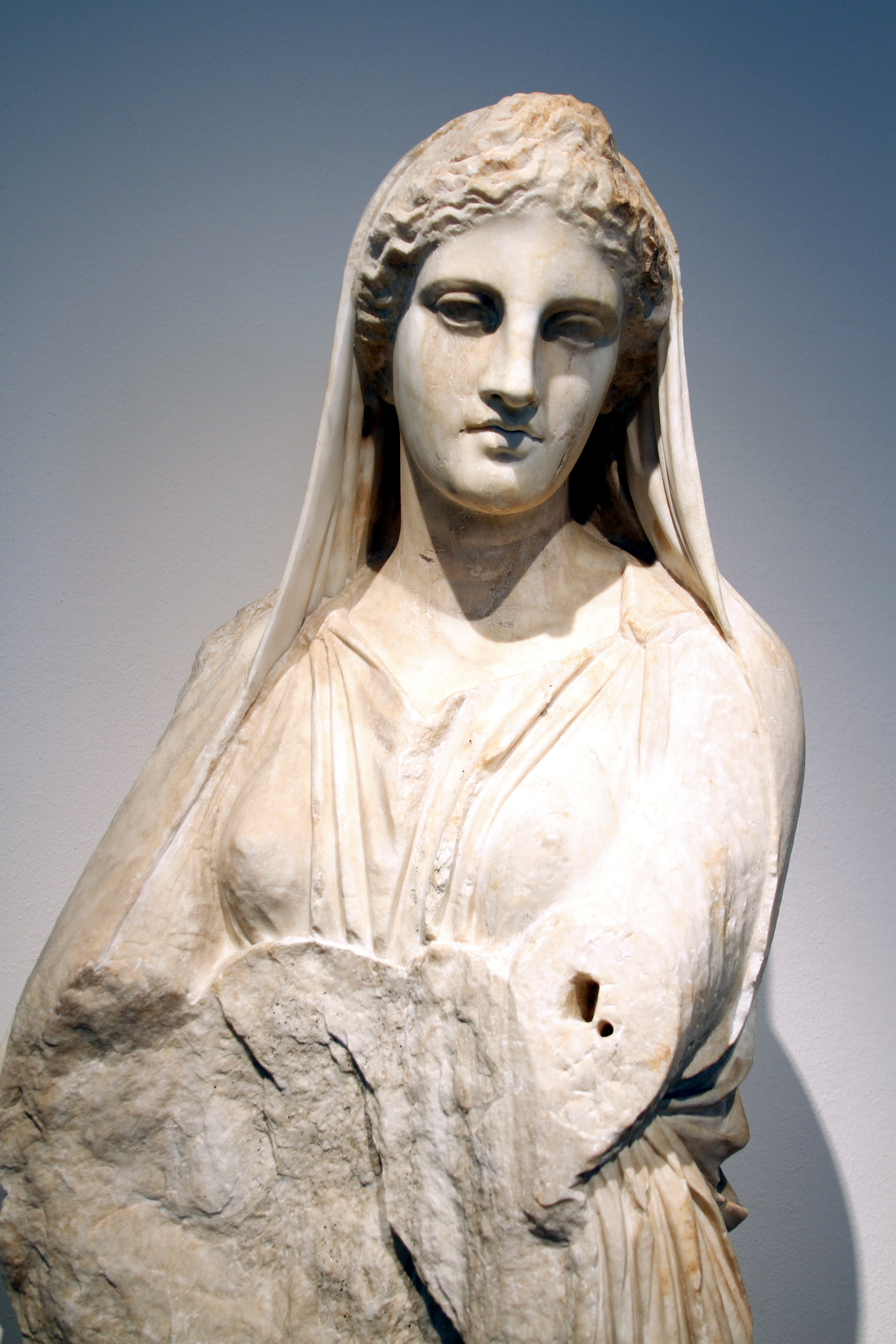 Altes Museum - Berlin - Germany